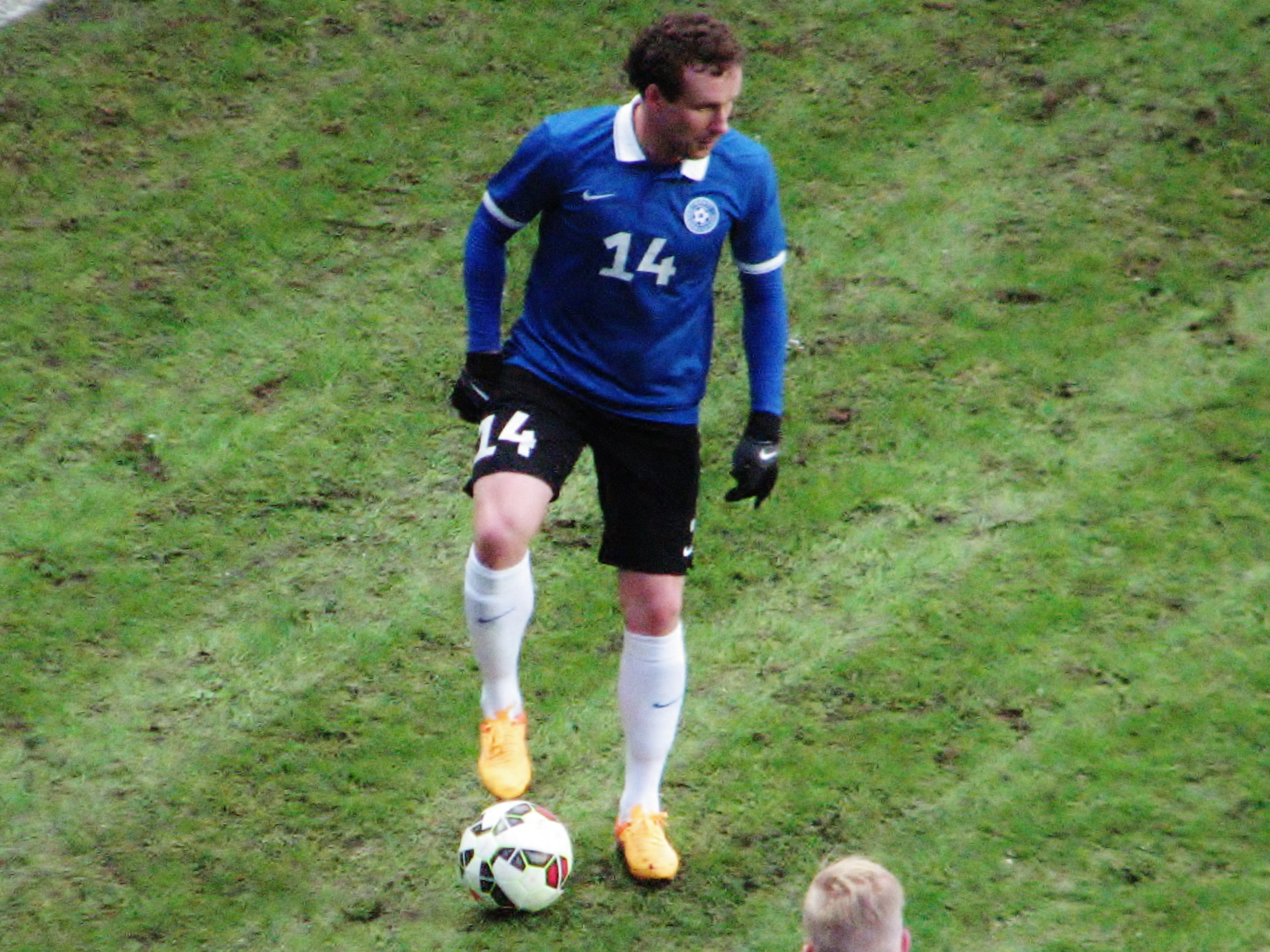 Konstantin Vassiljev mängimas Islandi koondise vastu Raio Piiroja lahkumismängus